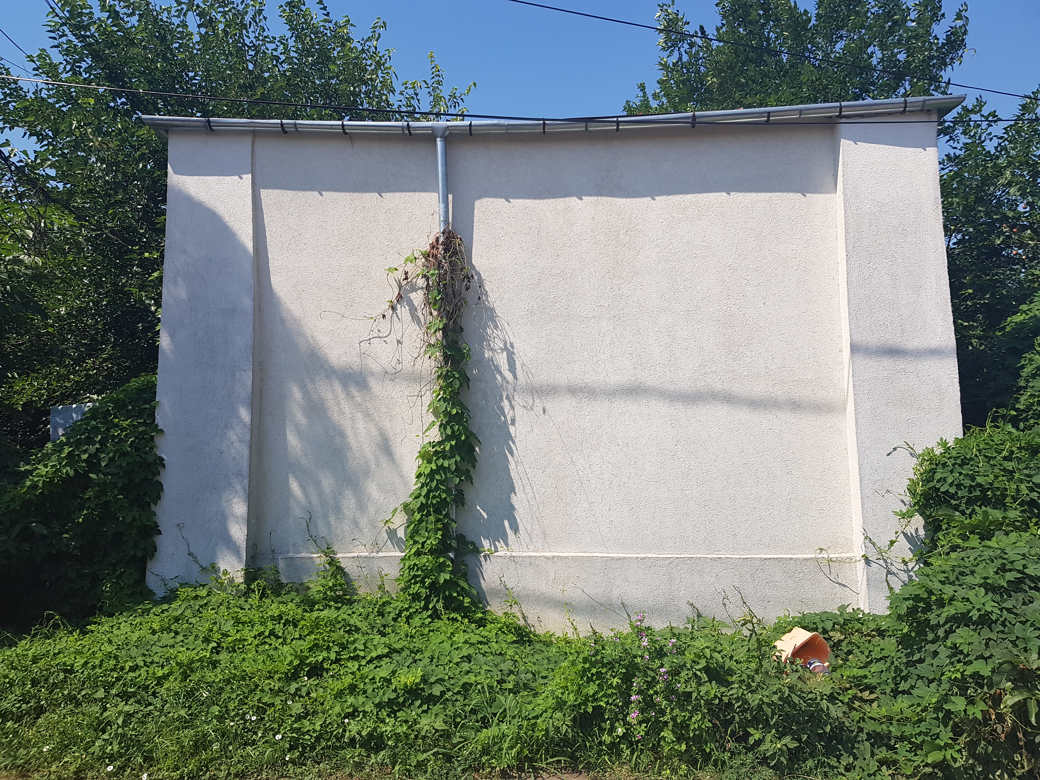 Monuments istoric